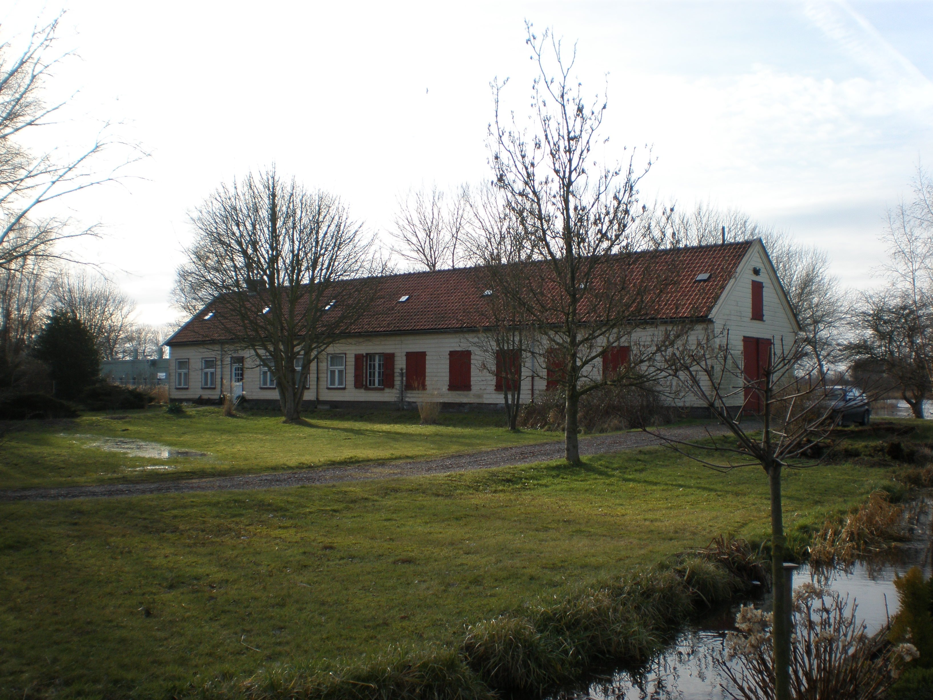 Stelling van Amsterdam: Fort bij de Liebrug, bergloods